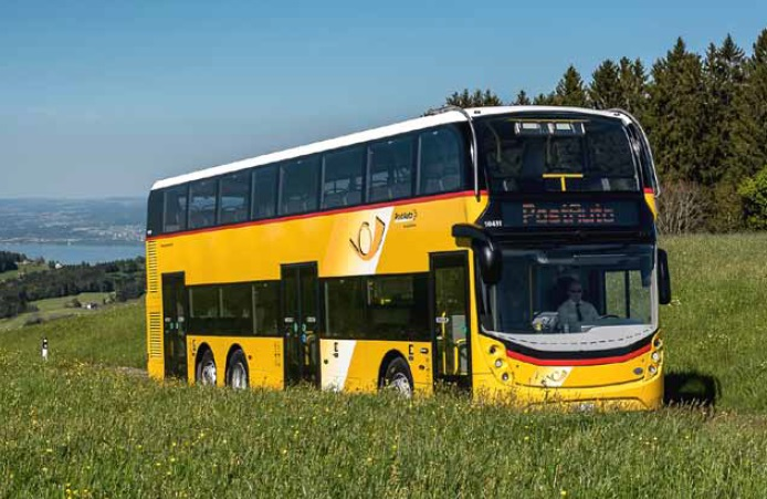 Doppelstockbus Alexander Dennis Enviro500 der Postauto Ostschweiz im Appenzeller Vorderland, im Hintergrund Bodensee